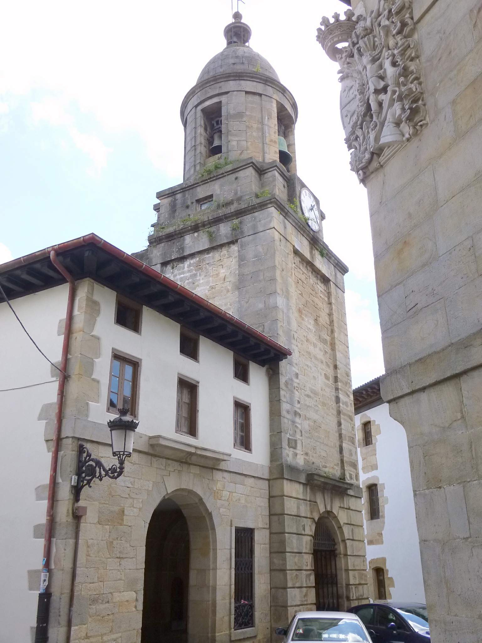 Iglesia de San Millán, en Salinas de Léniz (Leintz-Gatzaga), Gipuzkoa